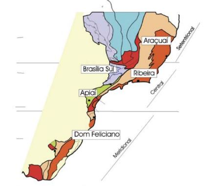 Compartimentação tectônica da Província Mantiqueira